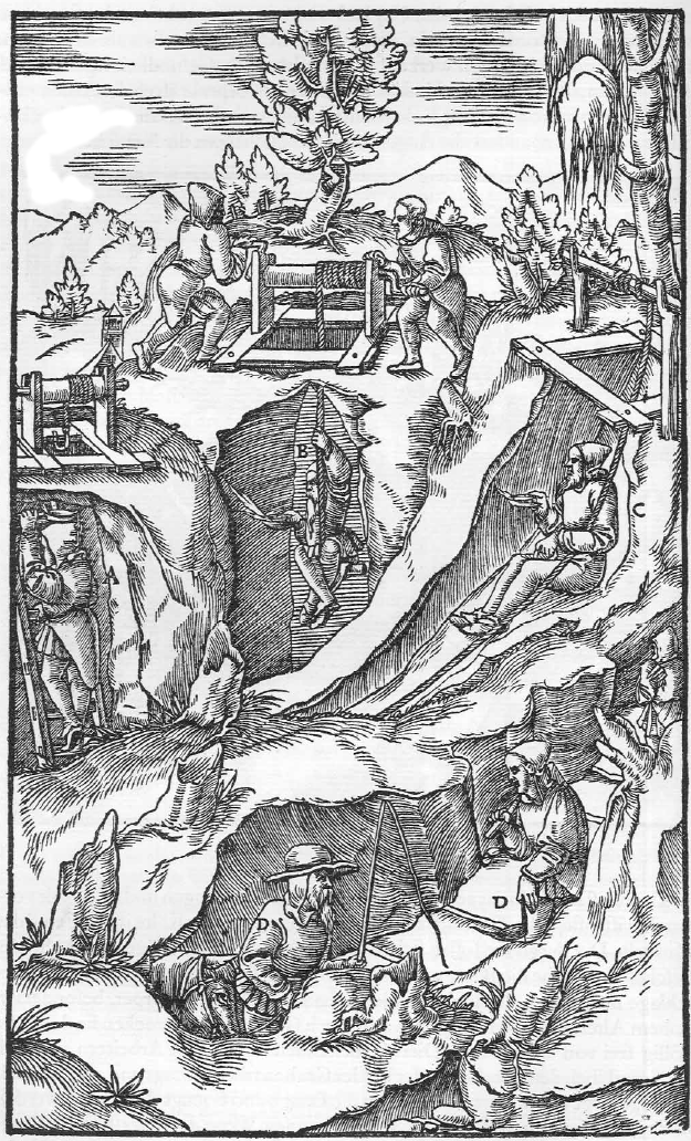 "Die verschiedenen Arten der Fahrung" A: Ein Bergmann, der auf der Fahrt einfährt B: Einer, der auf dem Knebel sitzt C: Einer, der auf dem Leder einfährt D: Auf Stufen, die im Gestein hergestellt sind, Einfahrende